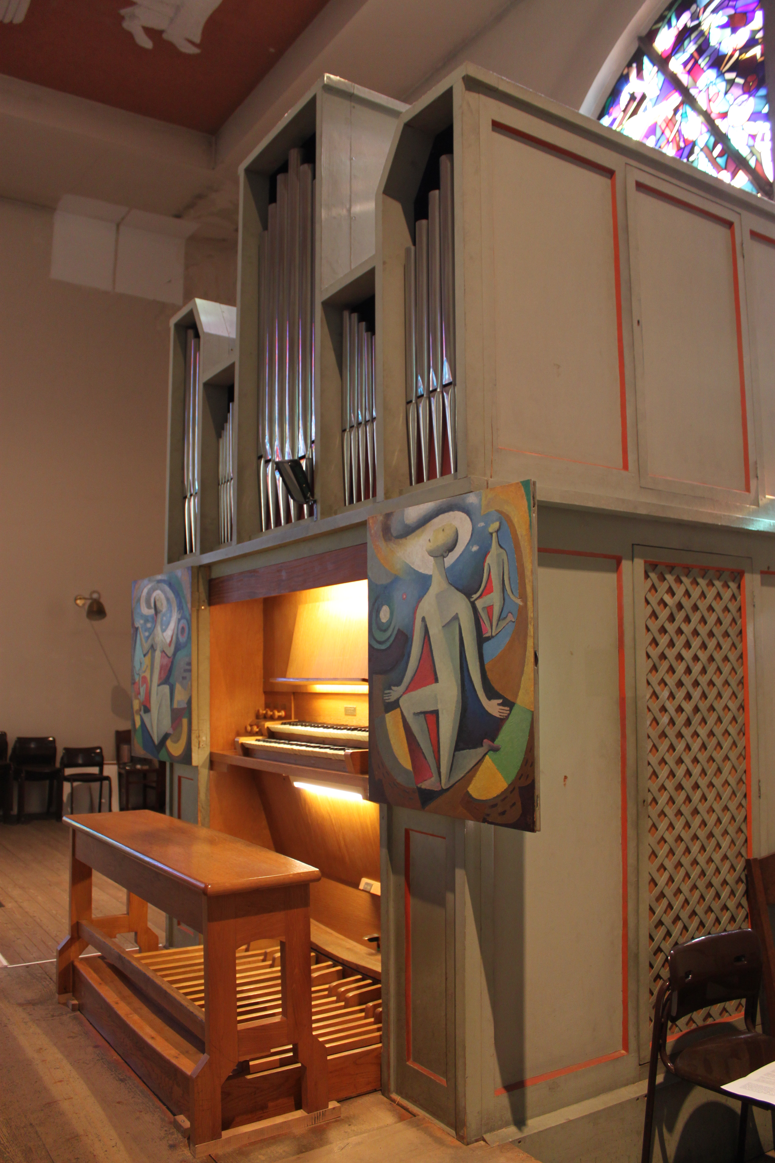 Hauptgehäuse der Pirchner-Orgel der Pfarrkirche Sandleiten, Wien 16, errichtet 1958.